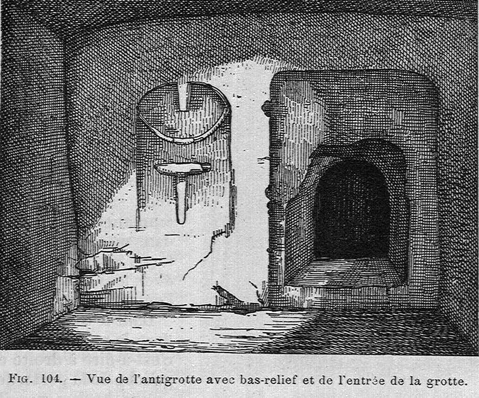 " La France préhistorique, d'après les sépultures et les monuments " / Emile Cartailhac. - Paris : F. Alcan, 1889. Fig. 104; Titre provenant de la sortie imprimée. Vue de l'antigrotte avec bas-relief et de l'entrée de la grotte. Grotte de Courjeonnet (Marne)